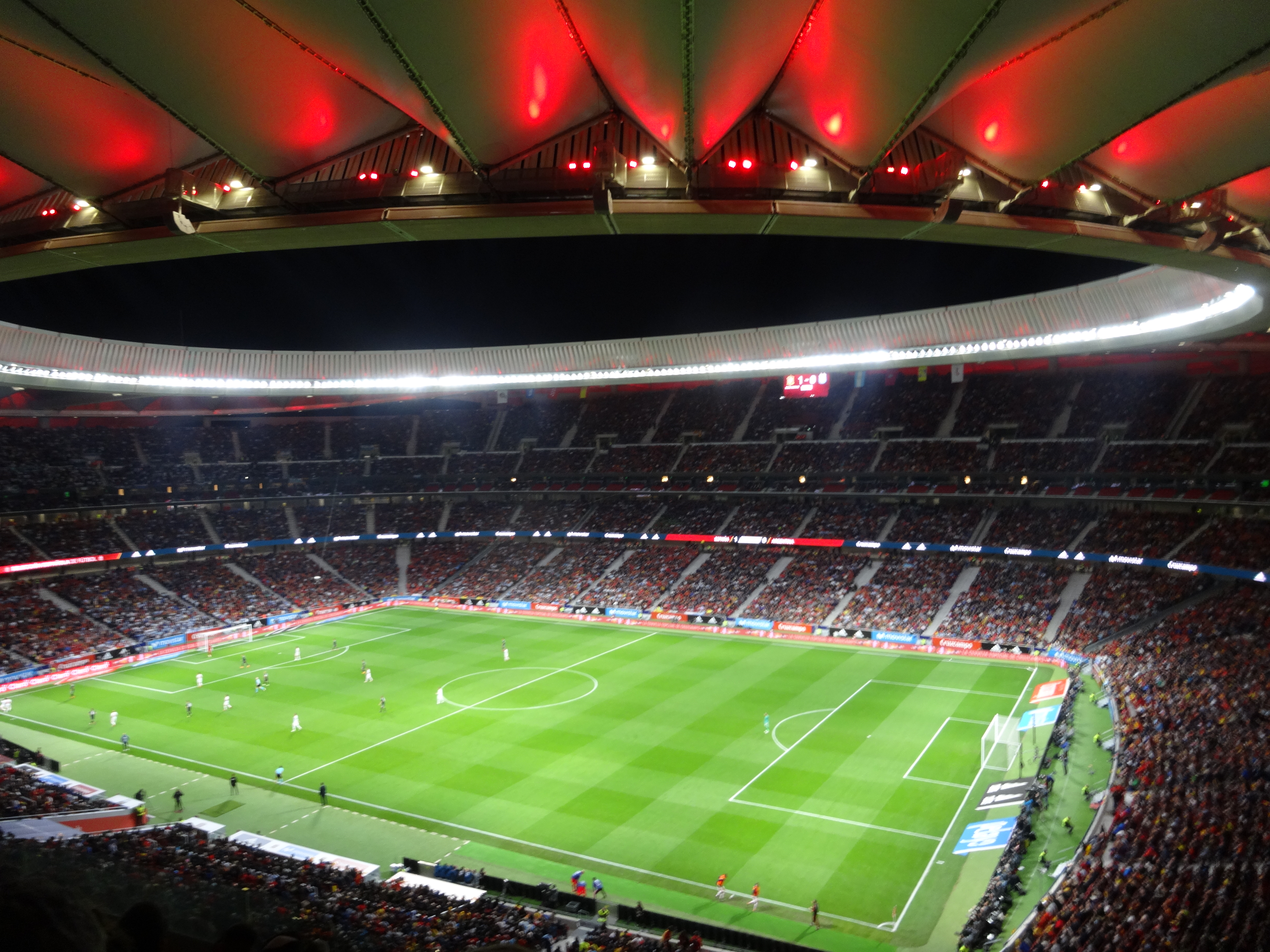 El Estadio Wanda Metropolitano durante el partido amistoso entre España y Argentina.